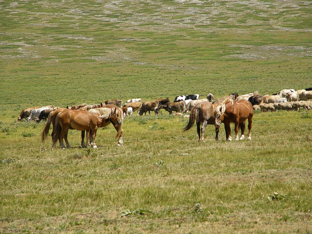 Campo Imperatore